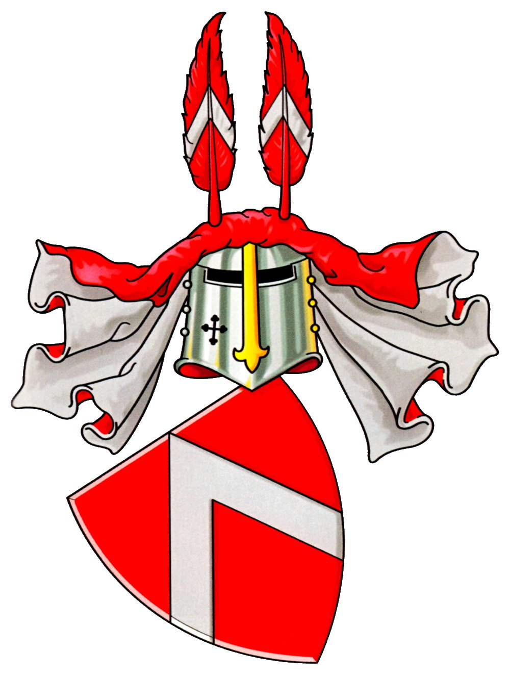 Wappen der Familie von Ledebur/Ledebour Wappenbeschreibung „In Rot ein silberner Sparren. Auf dem Helm mit rot-silbernen Decken zwei wie der Schild bezeichnete Federn.“